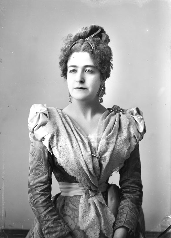 Retrat de bust de l'actriu María Tubau.